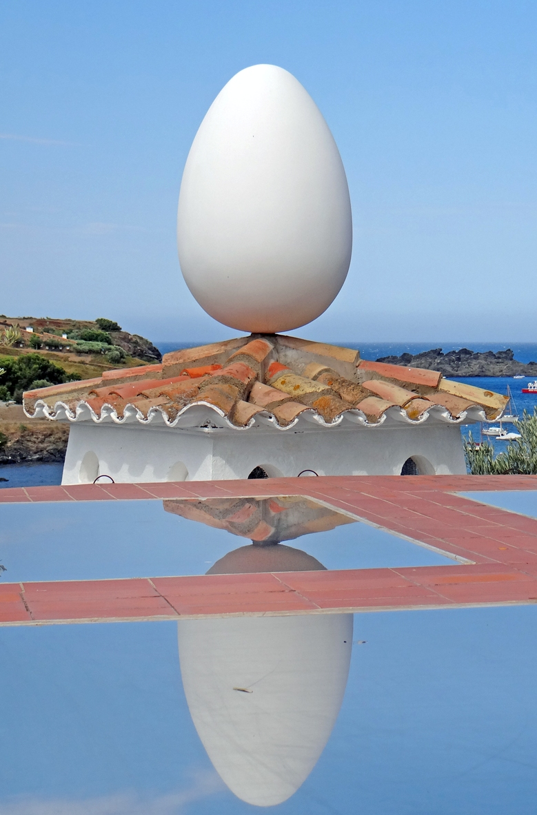 L'oeuf sur le toit du colombier conçu par Dali dans la cour de la maison L’actuelle Maison-musée de Portlligat a été la seule résidence stable de Salvador Dalí; l'endroit où il a vécu et travaillé régulièrement jusqu'à la mort de Gala, en 1982, date à laquelle il s'est installé au Château de Púbol. En 1930, séduit par le paysage, la lumière et l'isolement des lieux, Salvador Dalí s'était installé dans une petite maisonnette de pêcheurs de Portlligat. À partir de cette construction initiale, il créa peu à peu, quarante années durant, une maison, la sienne, qu'il définissait "comme une véritable structure biologique, [...]. À chaque nouvel élan de notre vie correspond une nouvelle cellule, une nouvelle pièce". Le site de la fondation